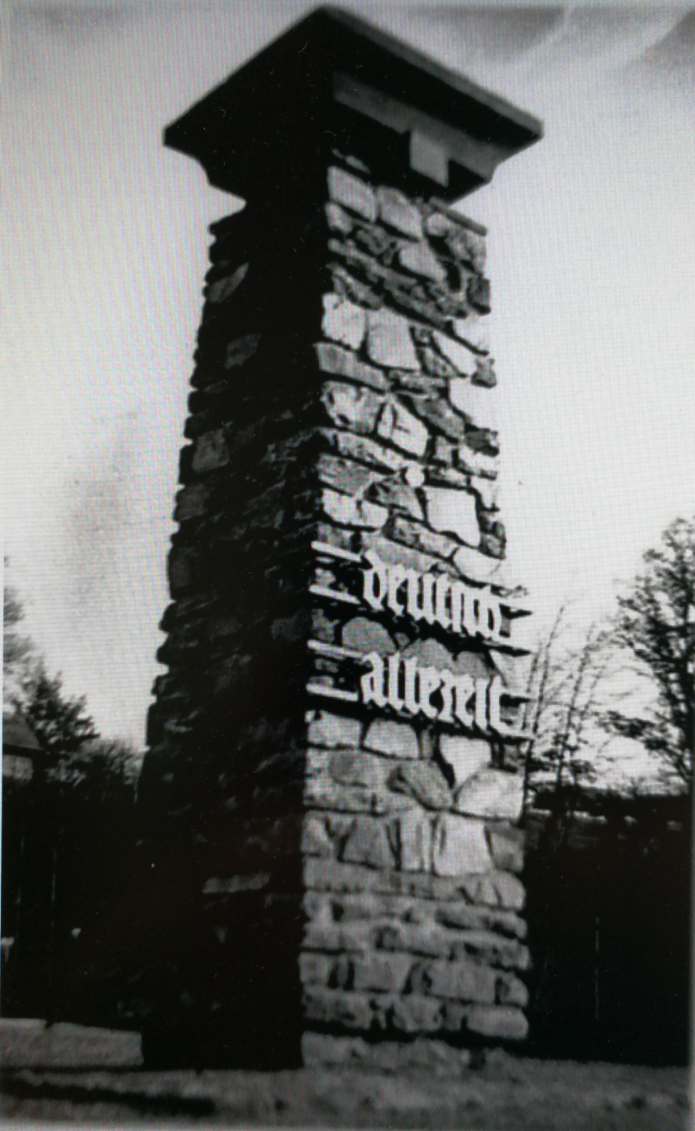 Das "kleine Anschlussdenkmal" in Oberschützen 1931